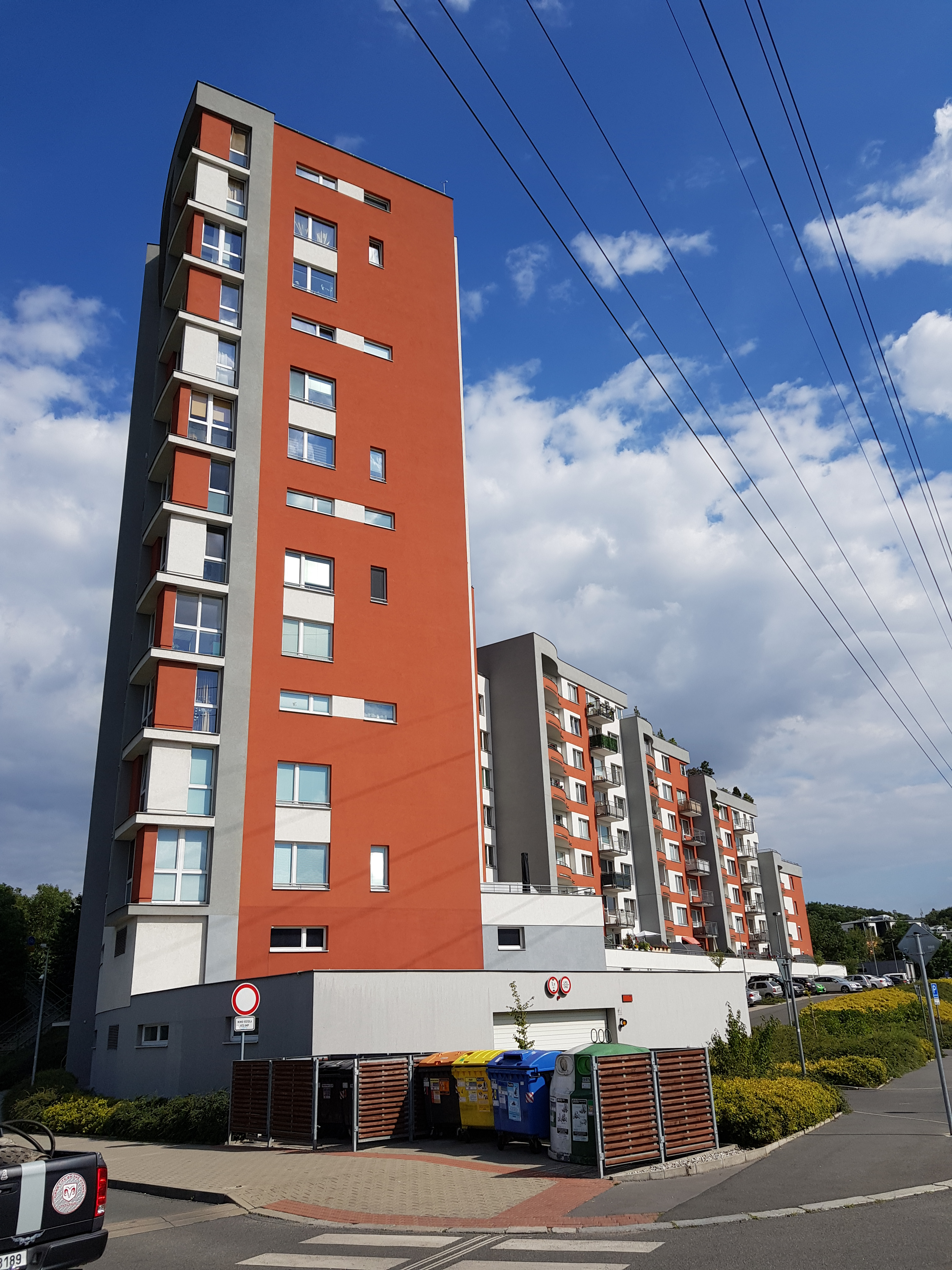 Bytový dům čp. 1069, Praha 9-Hloubětín